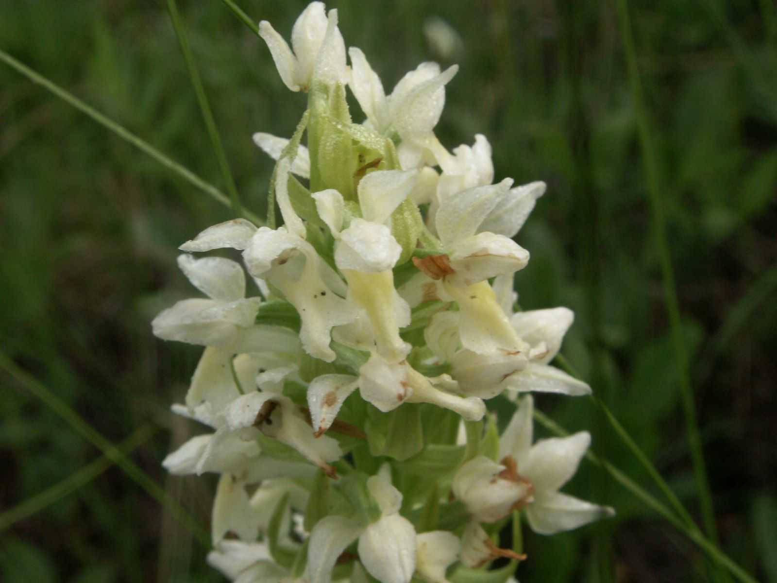 Dactylorhiza ochroleuca Litauen, Niedermoor